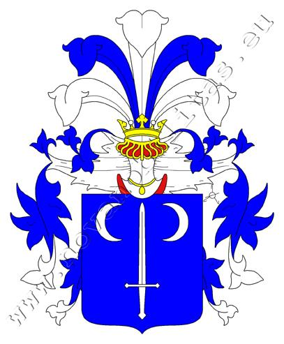 Jan Županič, Michal Fiala: Nová šlechta v českých zemích a podunajské monarchii (